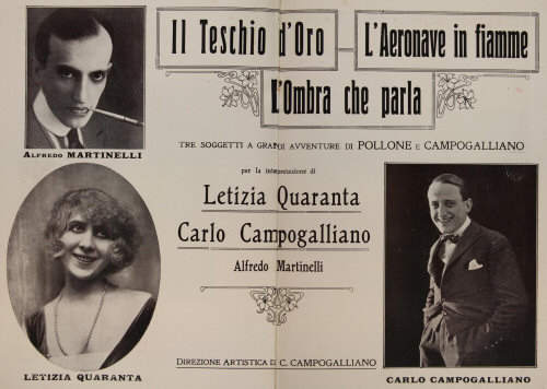 Presentazione del film in tre parti Il teschio d'oro dalla brochure della FERT. FERT Produzione Cinematografica, Primo bollettino, 1920. Coll. Museo Nazionale del Cinema, Torino. Bibliomediateca "Mario Gromo".